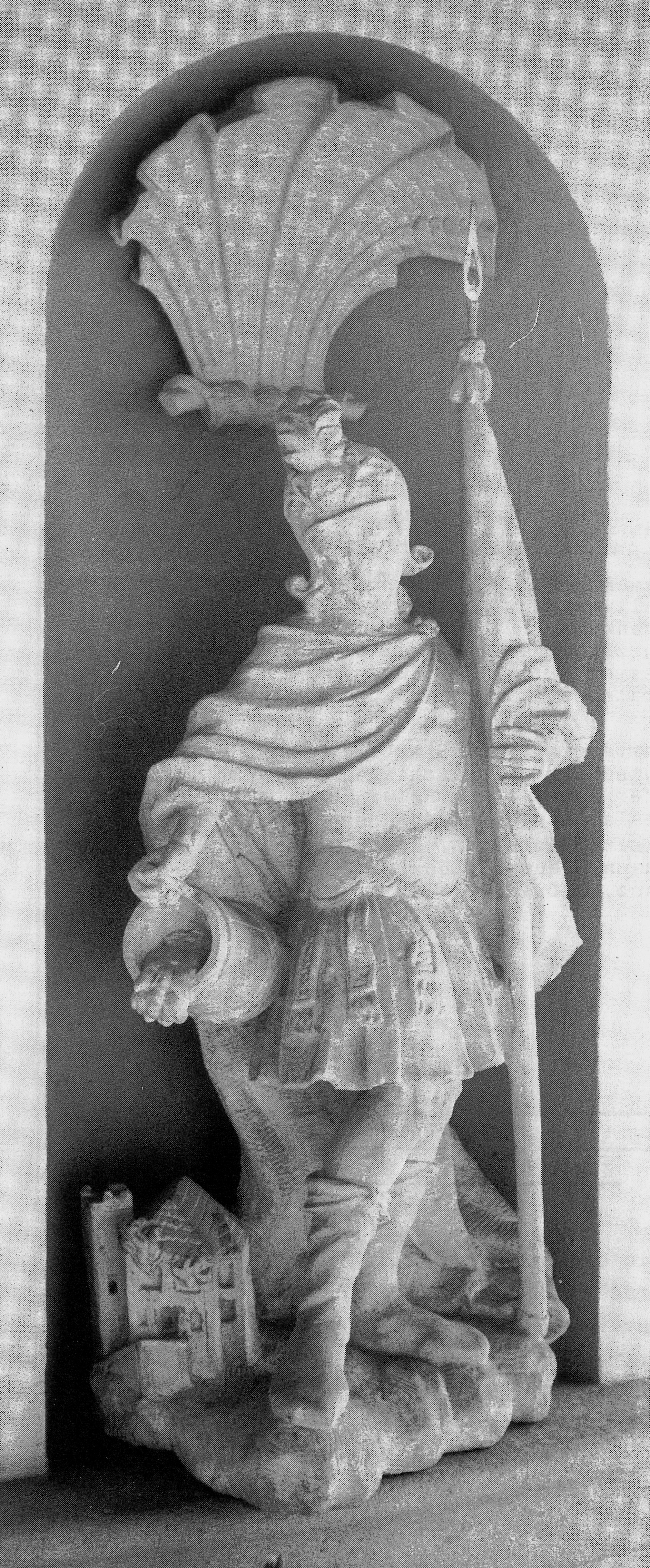 Florian-Kaiserstein